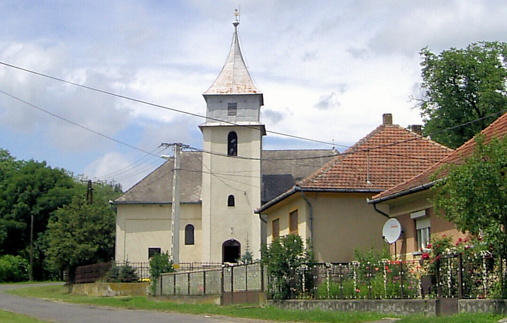 Református templom Nyíri